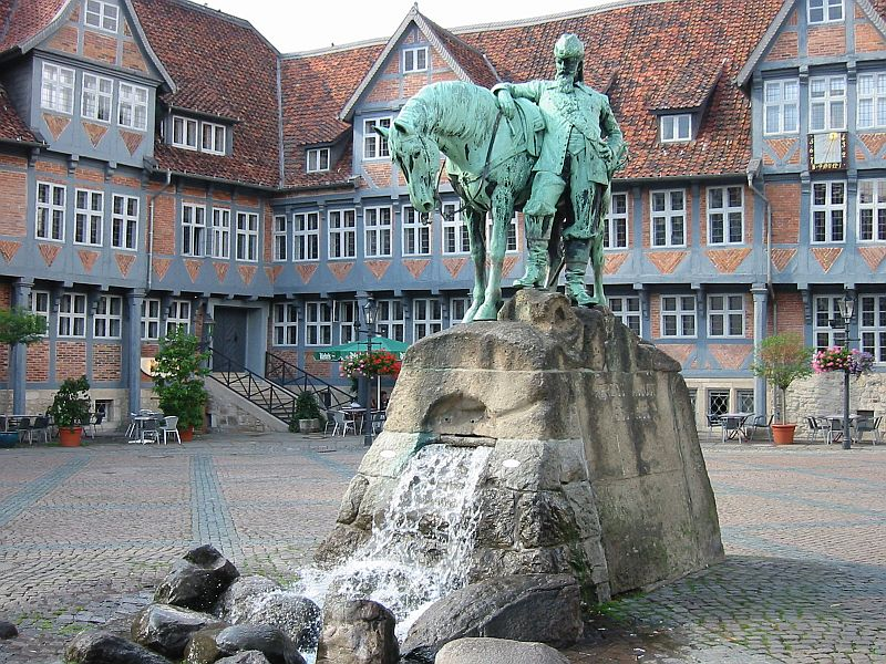 August II. (Braunschweig-Wolfenbüttel)-Denkmal von Georg Renatus Meyer-Steglitz auf dem Marktplatz in Wolfenbüttel